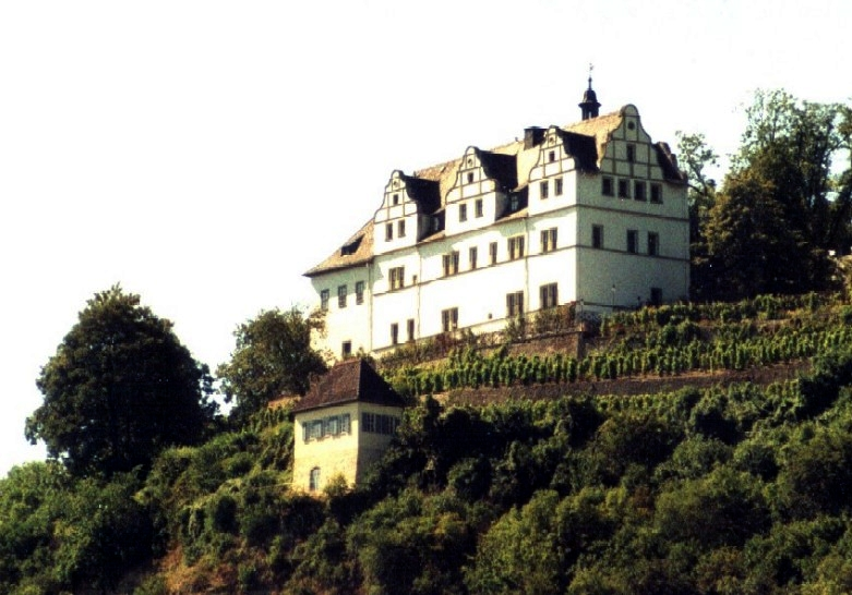 Dornburg - Renaissanceschloß - Saaleseite